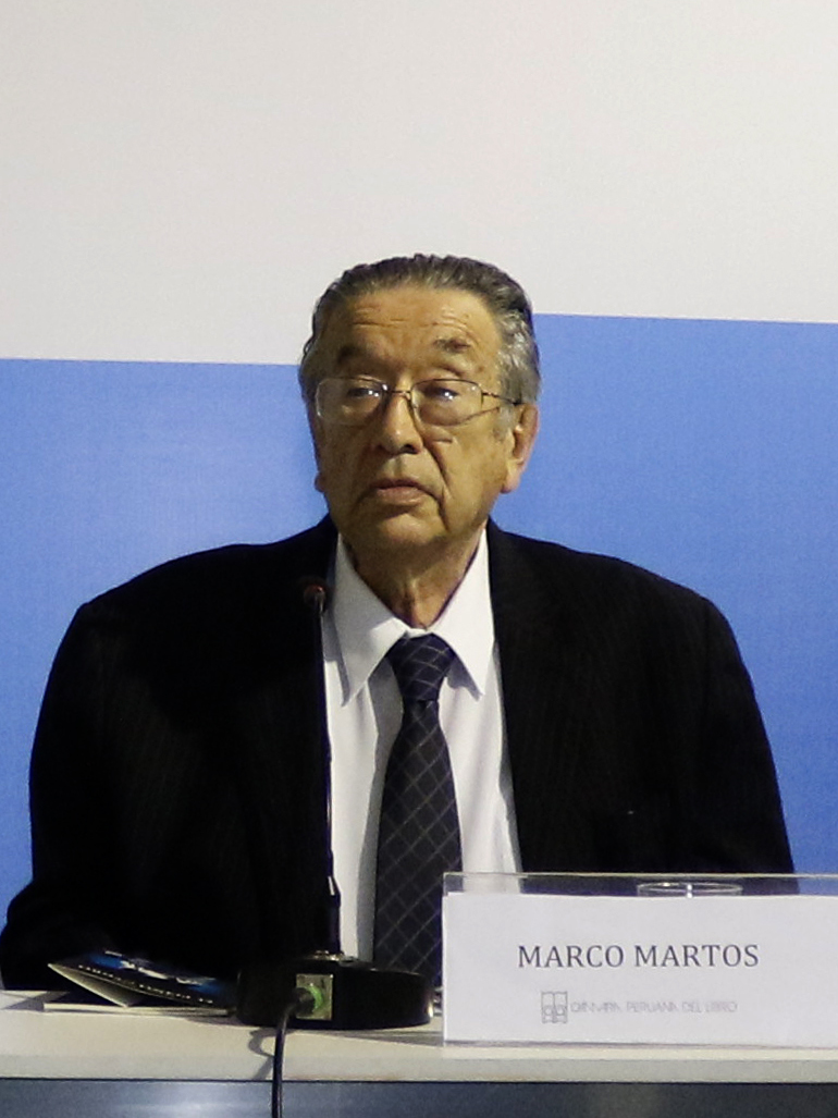 Marco Martos Carrera en 2018